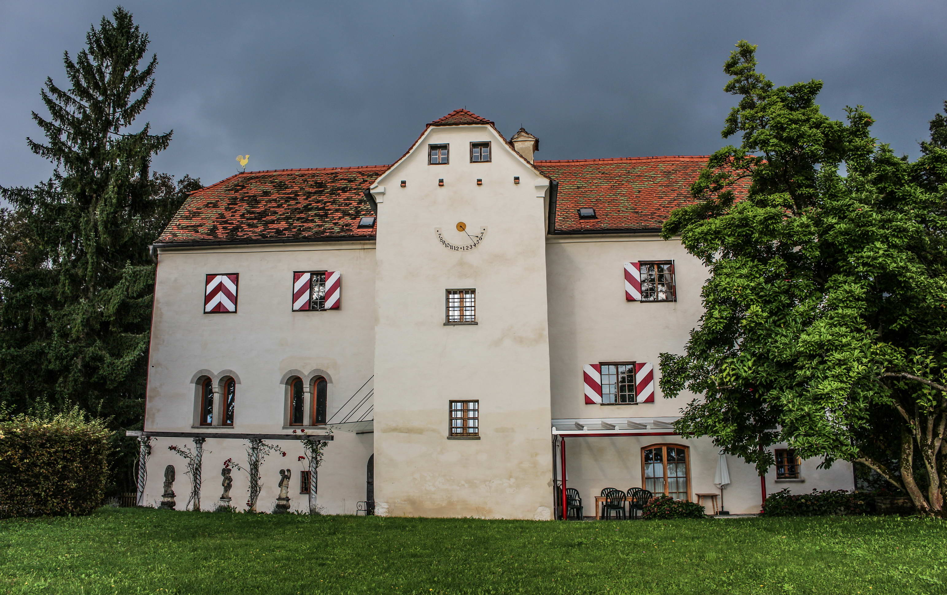 Hitzendorf – Schloss Tausendlust Dieses Bild wurde anlässlich des österreichischen Tags des Denkmals 2014 in der Steiermark eingereicht.